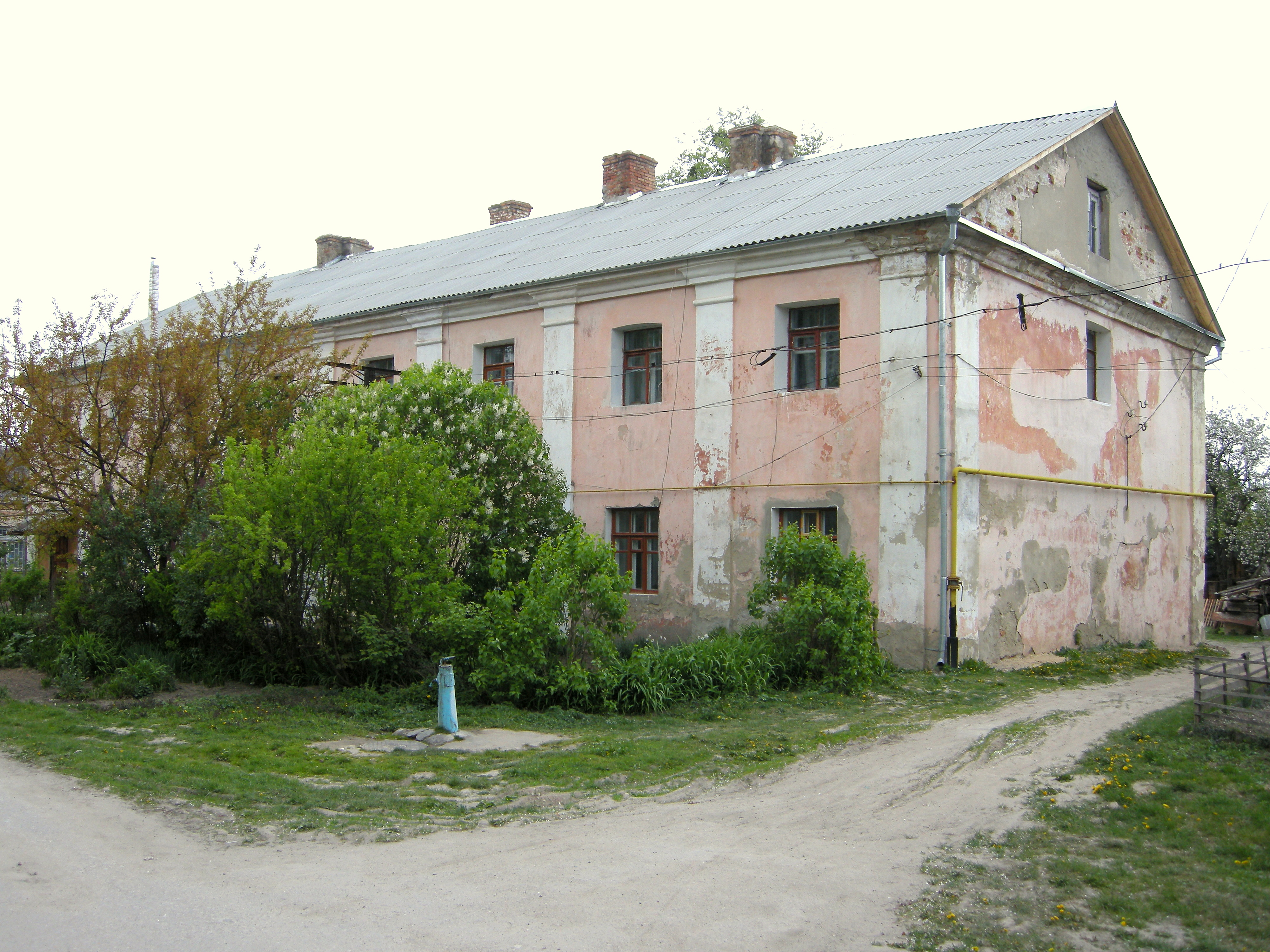 Шпиталь монастиря отців Лазаритів у Заславі. 1775 рік